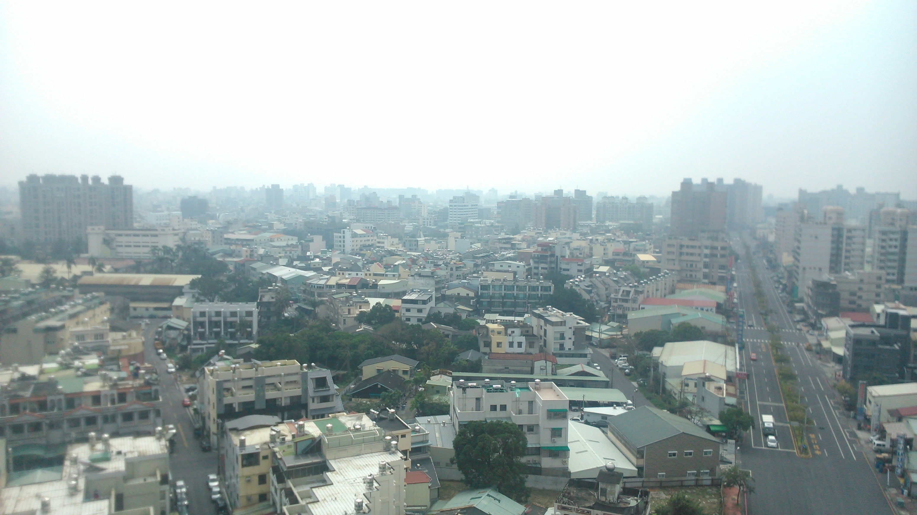 嘉義都市圏の景色